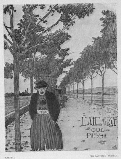 Cartell "l'alegria que passa" publicat al nº 2 de Catalònia el 1898 per Santiago Rusiñol